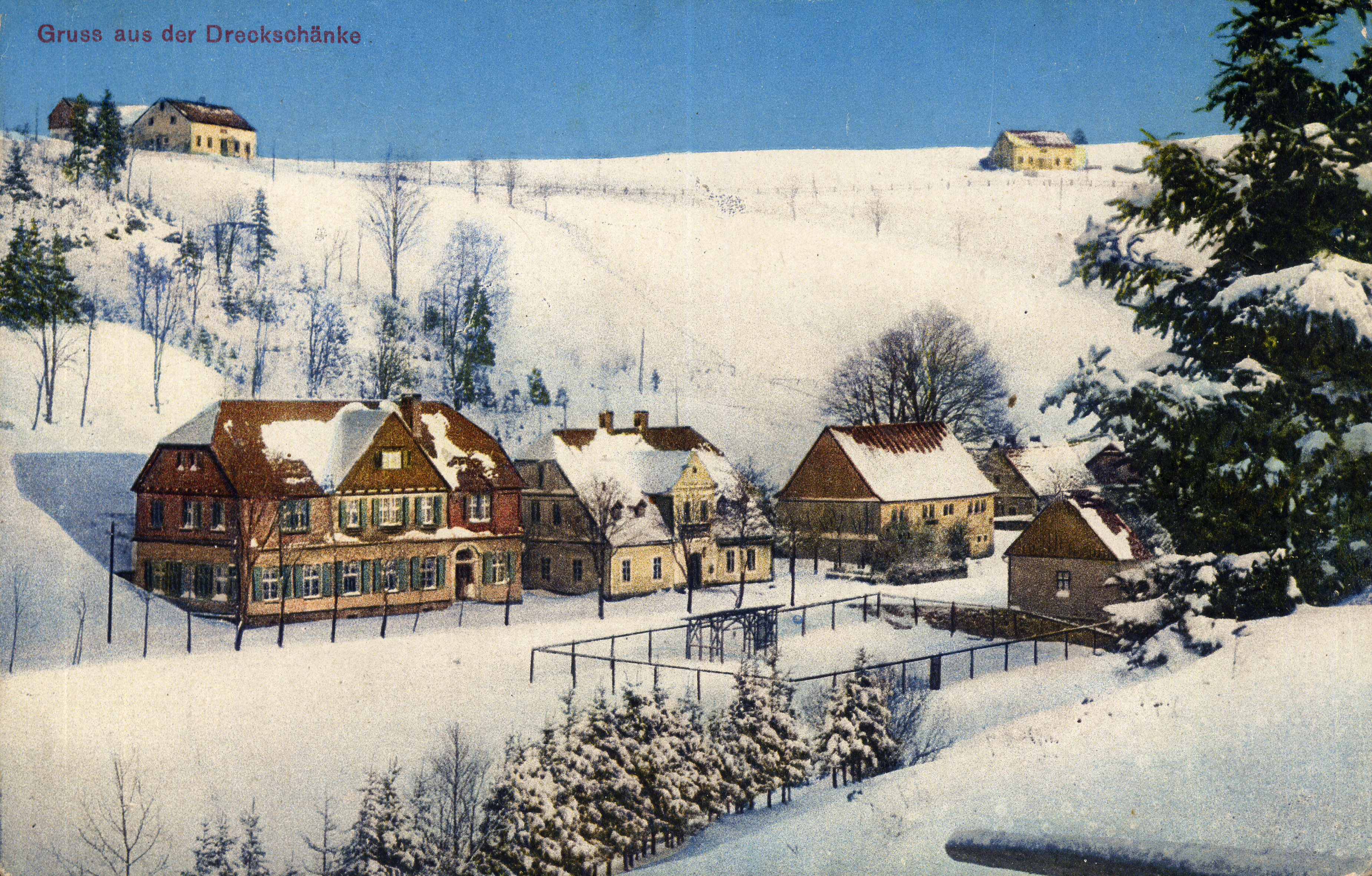 Die Dreckschänke 1924